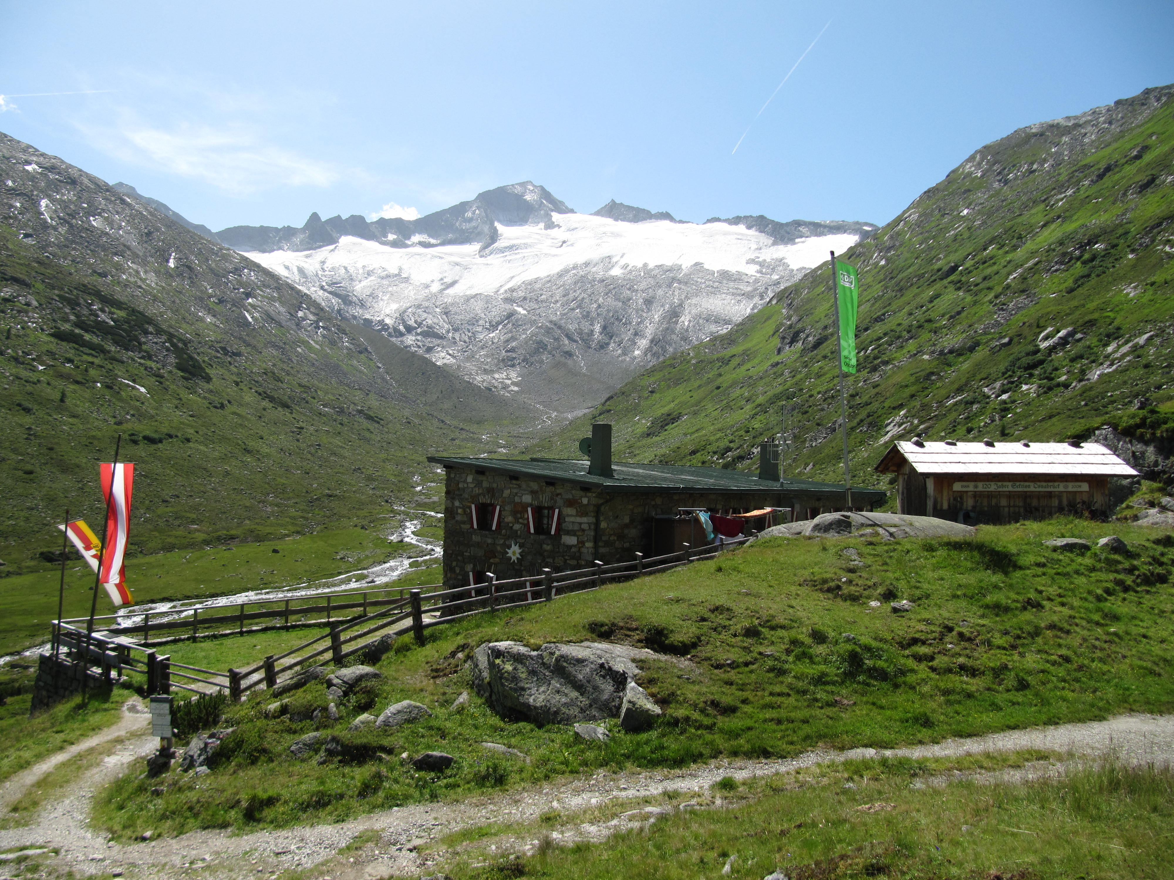 Osnabrücker Hütte gen Großelendkees, -kopf (3317m) u. Hochalmspitze (3360m)